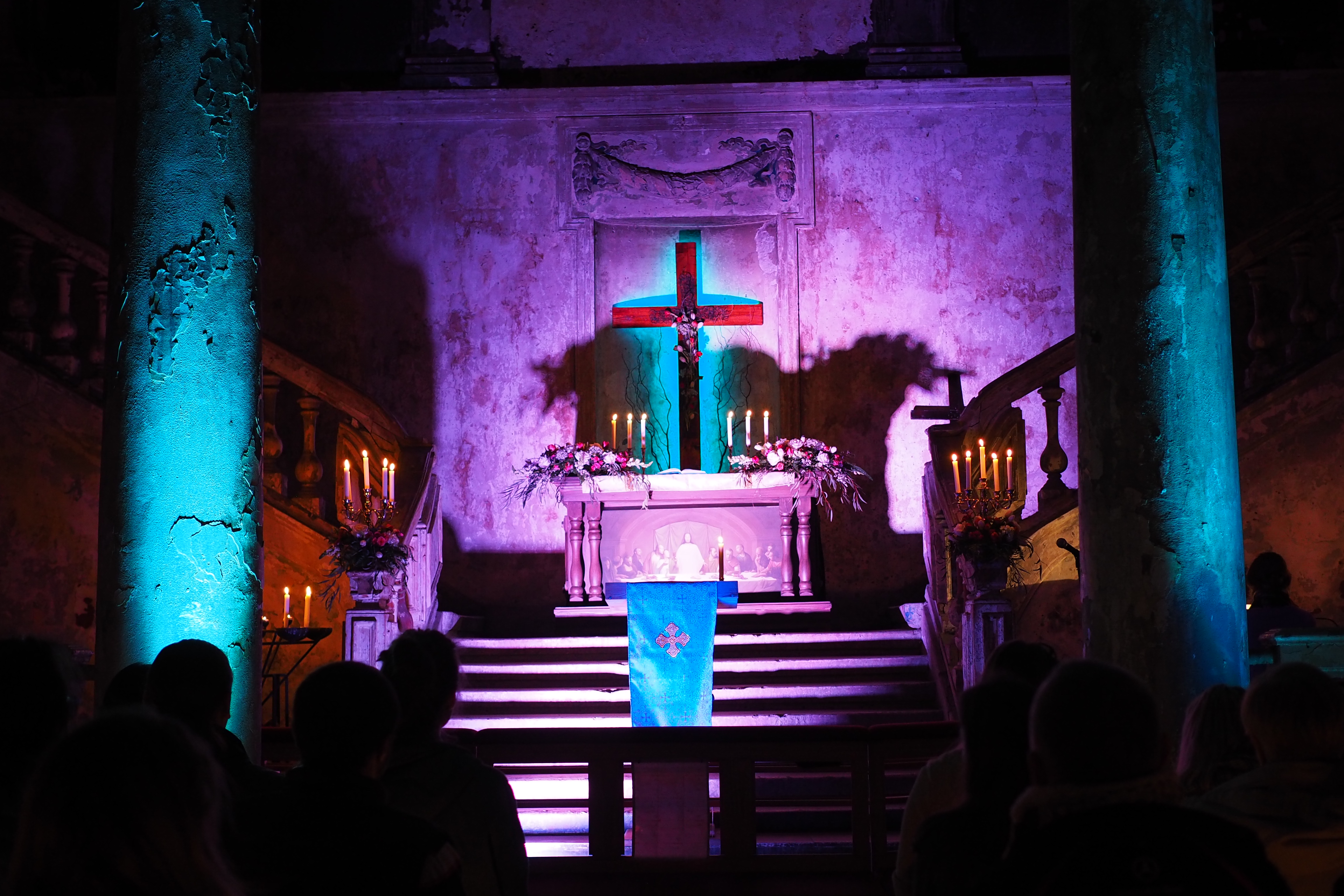 Лютеранская церковь св. Анны